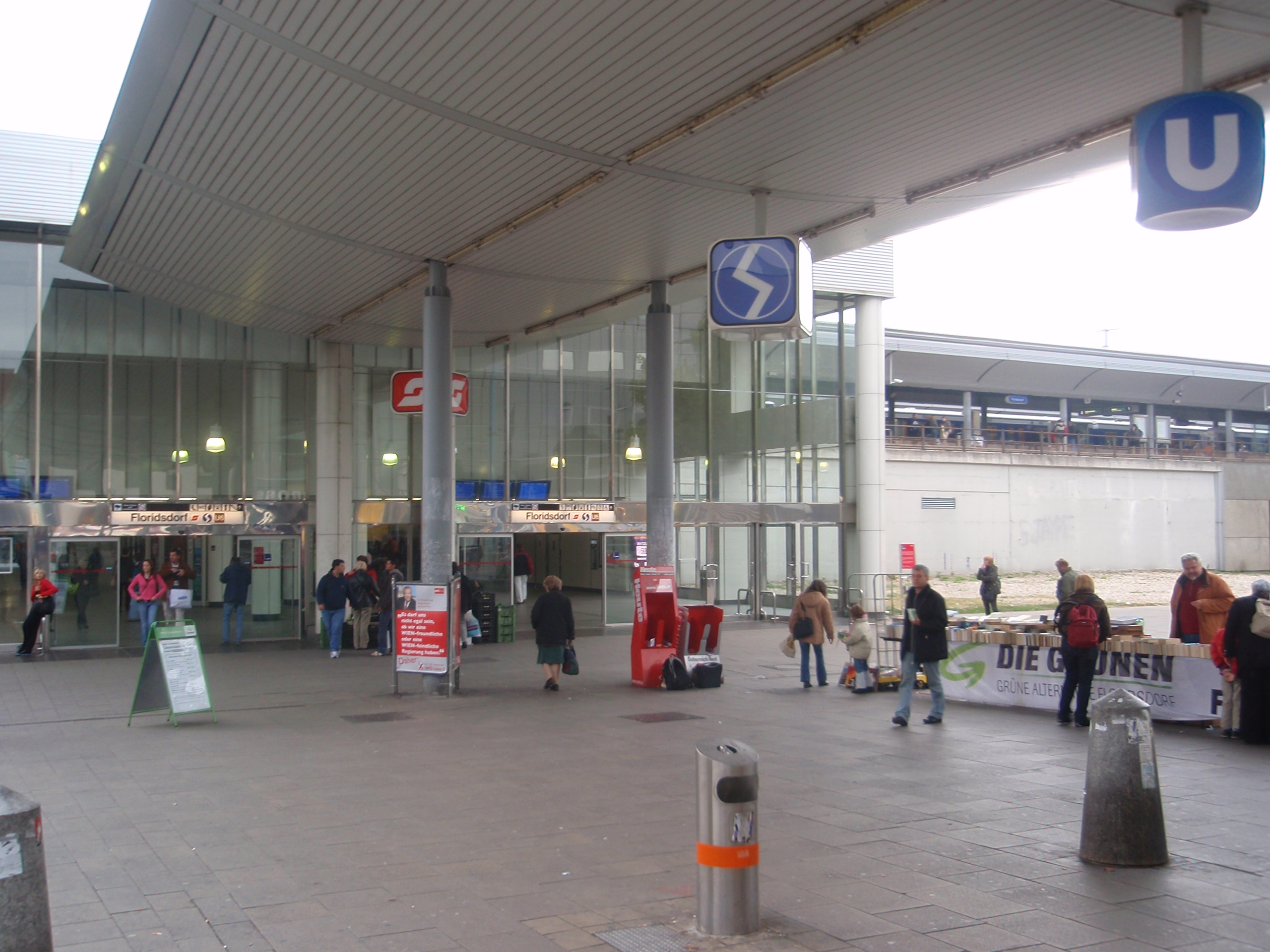 Bahnhof Wien Floridsdorf